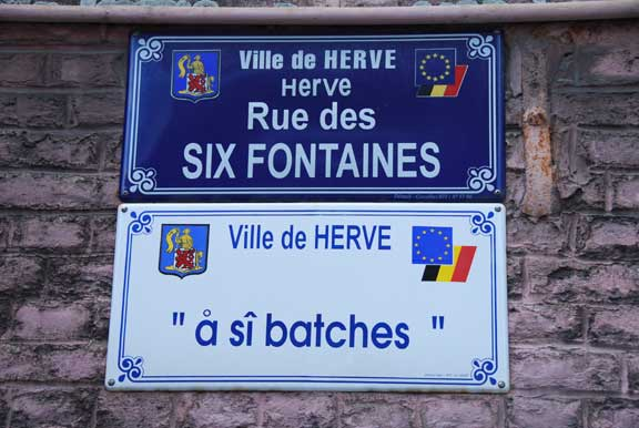 Limburgs: Twiètalig sjtraotnaambord in 't sjtedsje Herve deilgemeinte Pepinster, provincie Luuk (Liege) in Belsj (Belgium)